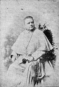 Kardinal Luigi Galimberti (1836-1896), Apostolischer Nuntius in Wien